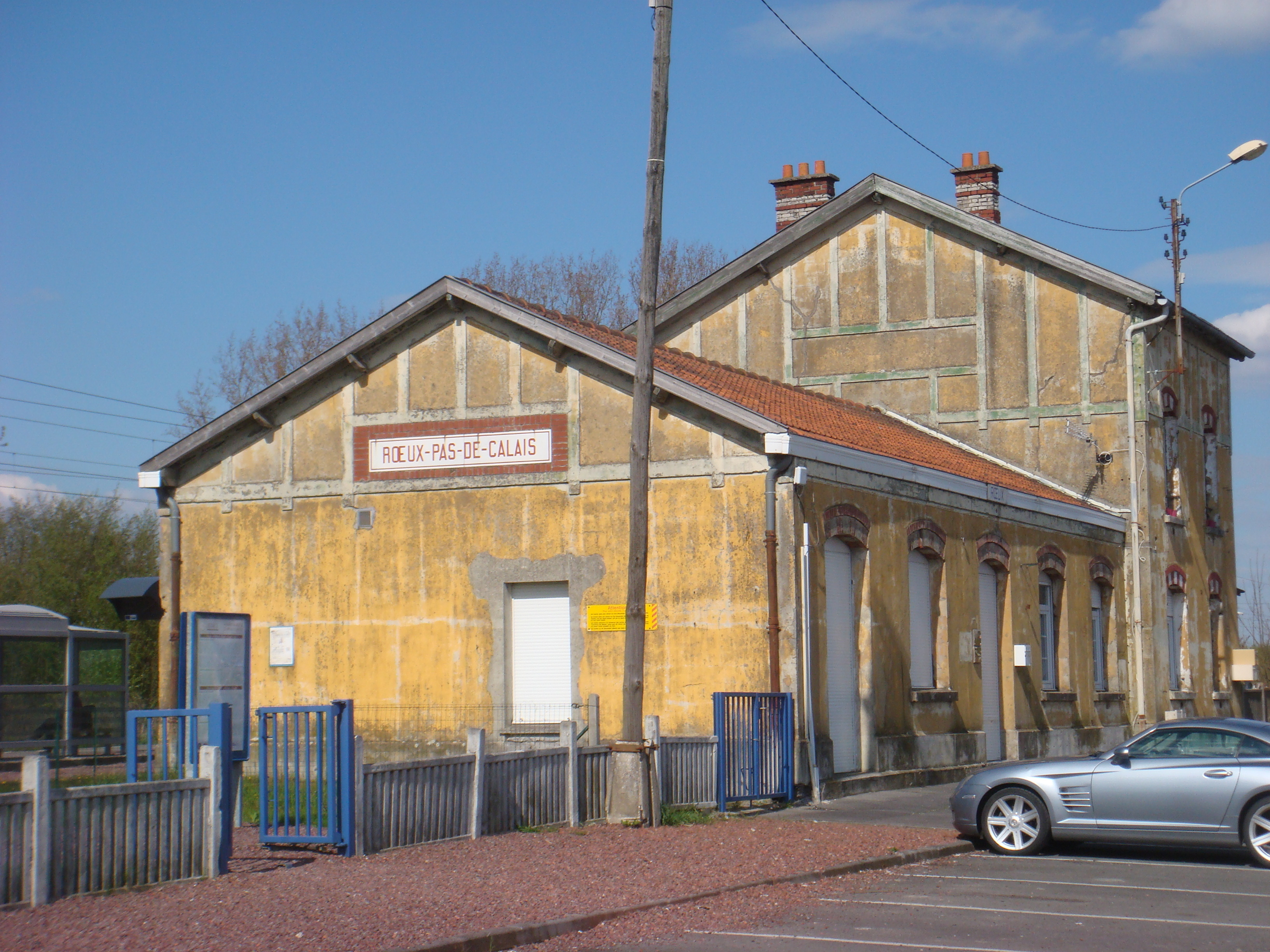 Gare de Roeux -pas de calais